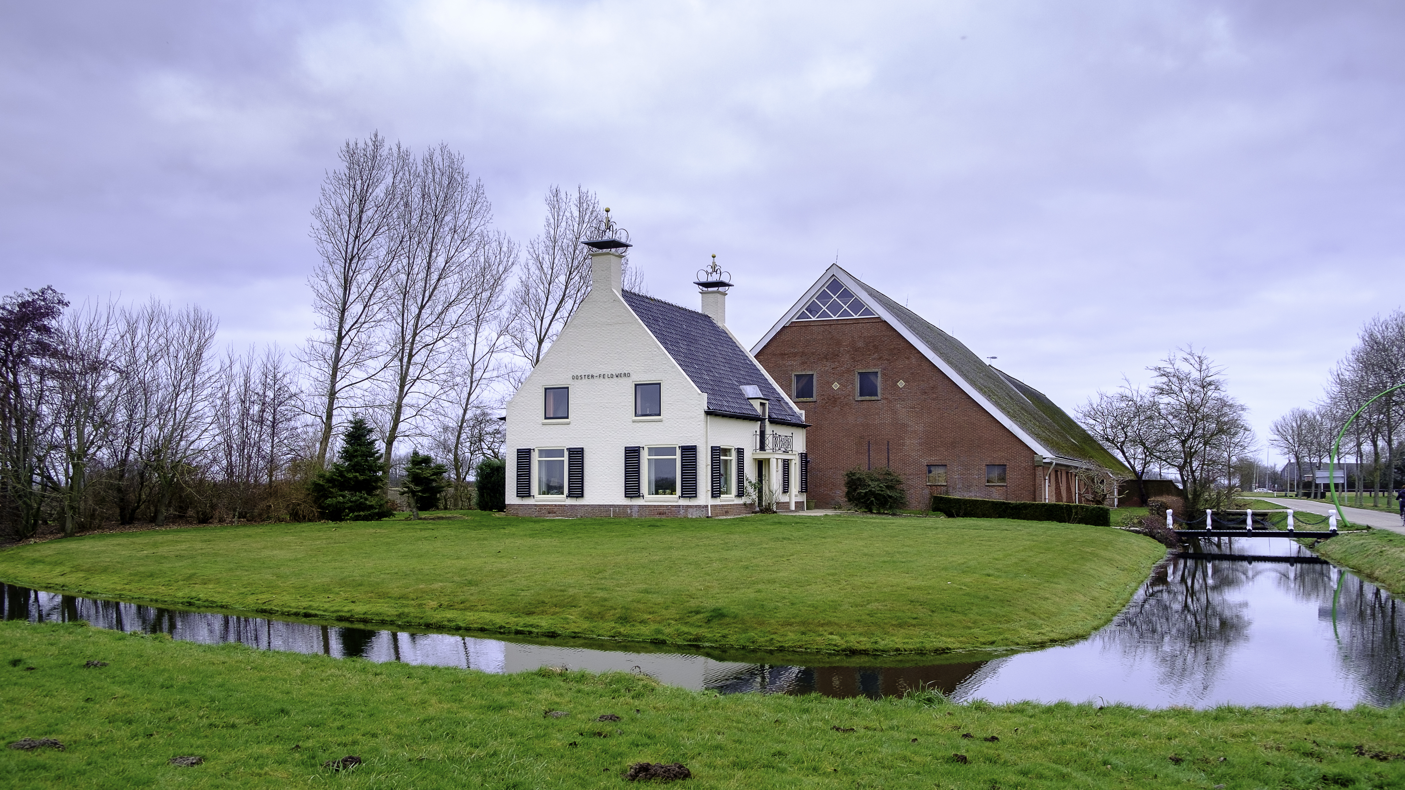 Boerderij Ooster-Feldwerd uit 1841 aan de Bierumerweg 1 in Holwierde. Zwaar beschadigd in 1945 en vervolgens grotendeels herbouwd.